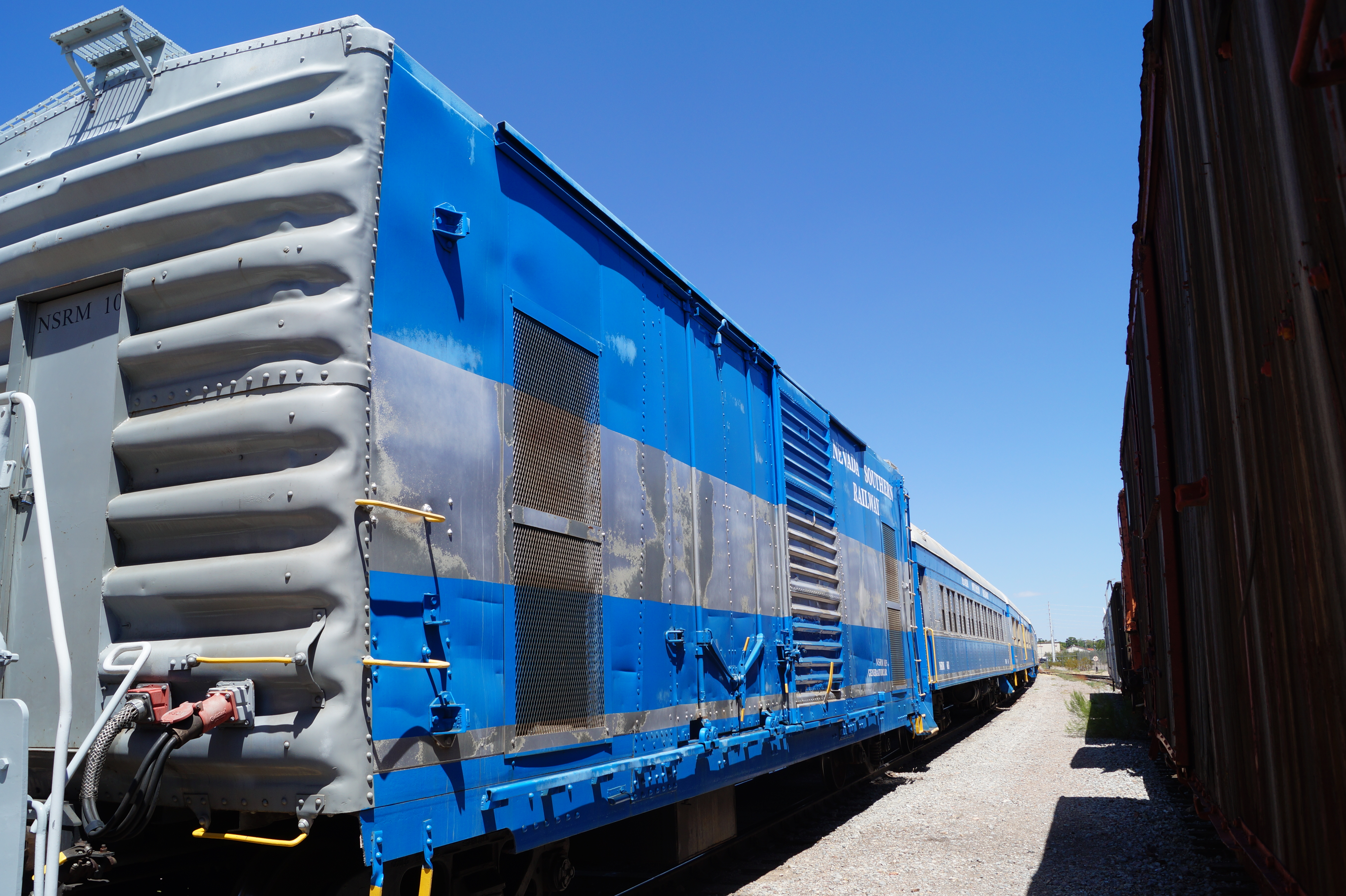 The Nevada State Railroad Museum which is an agency of the Nevada Department of Cultural Affairs. It is located at Yucca Street on the tracks of the historic Union Pacific Railroad branch Henderson-Boulder City near the former Boulder City Railroad Yards where the Hoover Dam construction equipment was unloaded in the 1930s.